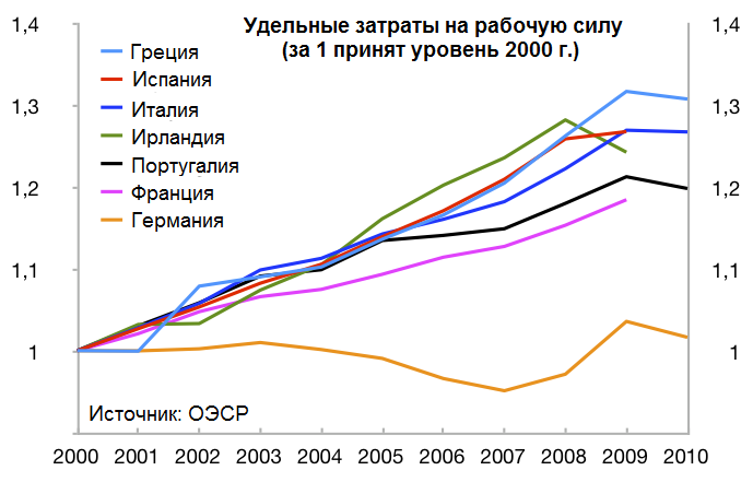 Удельные затраты на рабочую силу в Греции, Испании, Италии, Ирландии, Португалии, Франции и Германии с 2000 по 2010 г. (данные за 2000 г. принимаются за 1). Данные ОЭСР: (NB: за 1 принят 2005 г.)